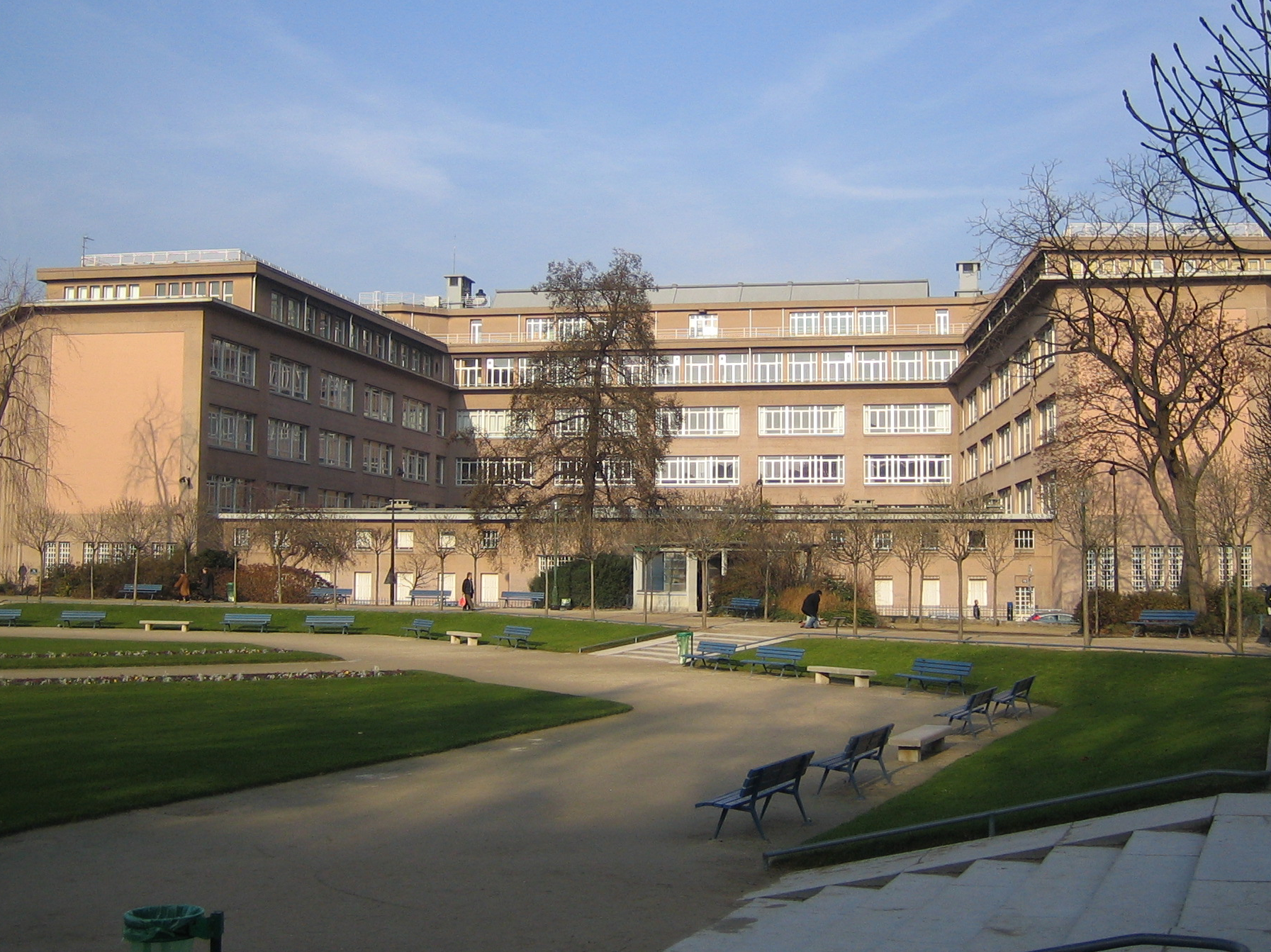 Vue du lycée Camille Sée depuis le square Saint-Lambert Lycée Camille Sée: In Paris.Photo by Caroline D. Laurent. Camera: Canon Digital IXUS 40 License on Flickr (2011-02-09): CC-BY-SA-2.0 Flickr tags: Camille Sée, Paris, Lycée, 75015